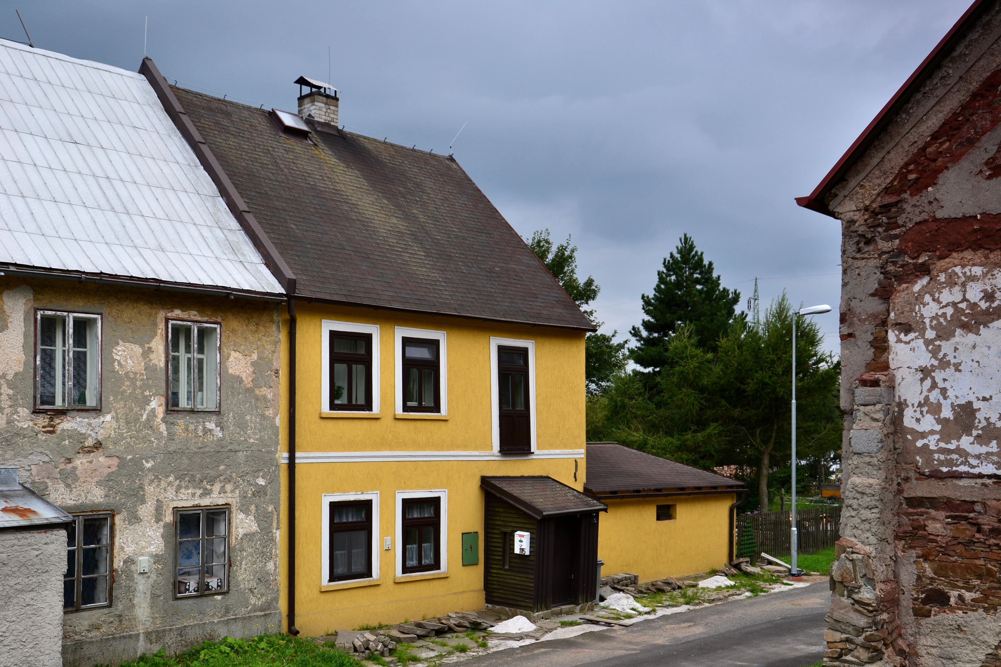 Městský dům (Měděnec), Široká 115, Měděnec